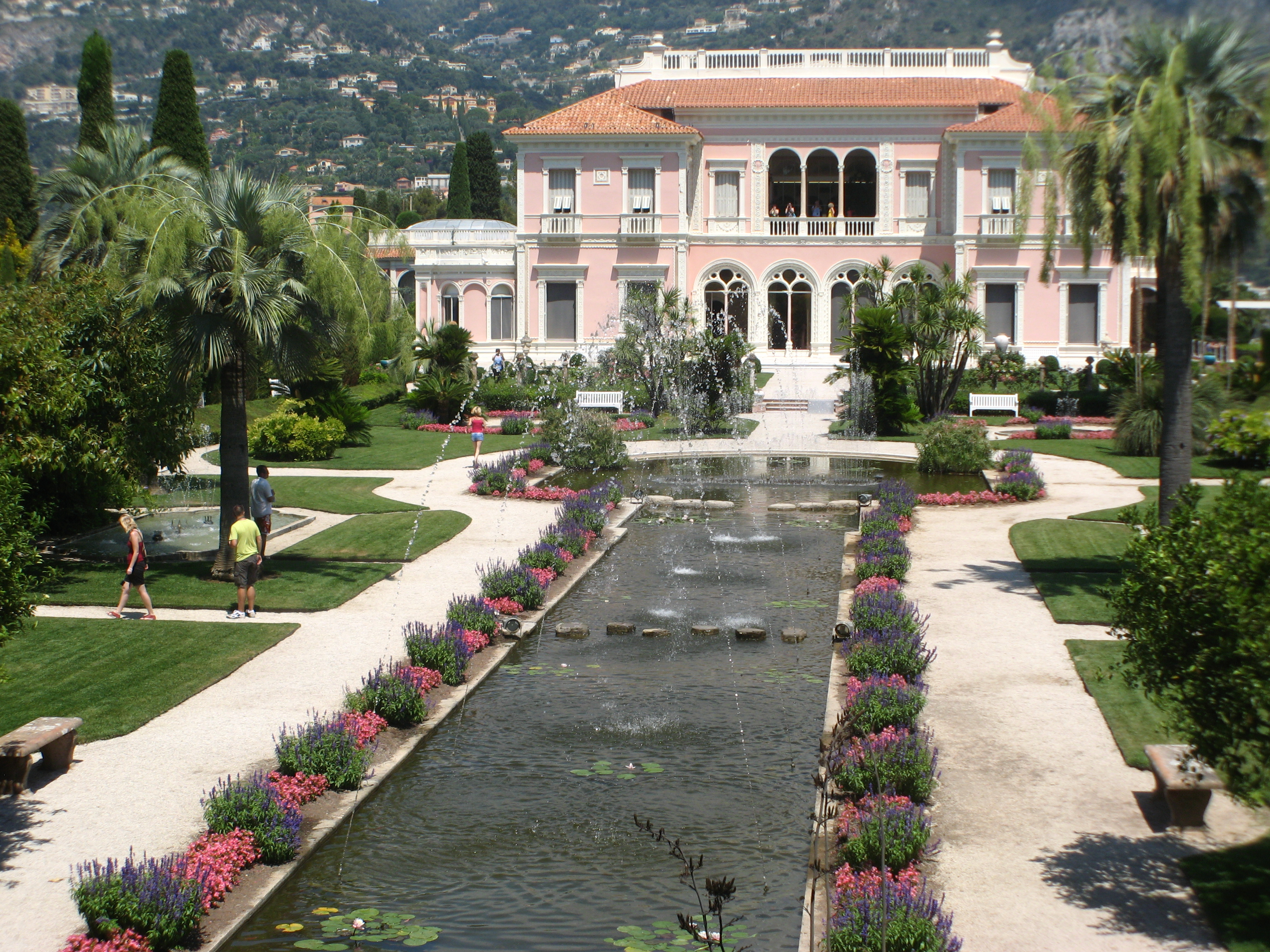 Villa Ephrussi de Rothschild vista dai suoi giardini